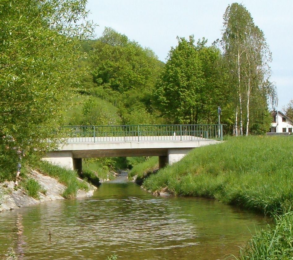 Der Schwarzbach am Ortsausgang von Riedern am Sand, Gemeinde Klettgau, ca. 880 m oberhalb der Einmündung des Seegrabens (ca. 8,5 km oberhalb des Zusammenflusses mit dem Klingengraben). Im Hintergrund der Eichberg, an dessen Abhängen sich die Burg Neu-Kränkingen befindet.